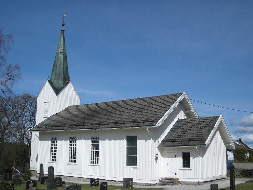 Setskog kirke, Aurskog-Høland